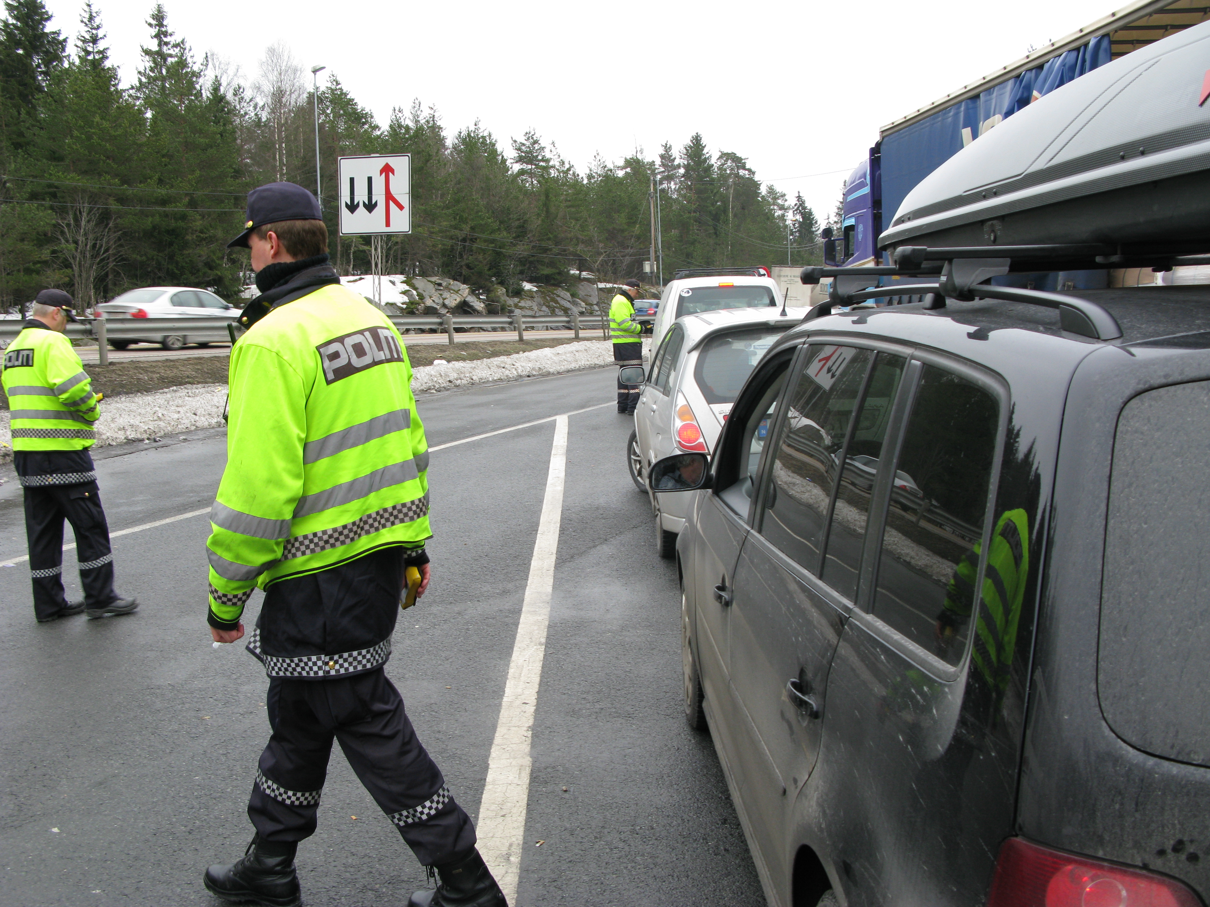 Samferdselsminister Magnhild Meltveit Kleppa og justisminister Knut Storberget var til stede da Utrykningspolitiet hadde kontroll på E18 ved Svartskog fredag 26. mars 2010.